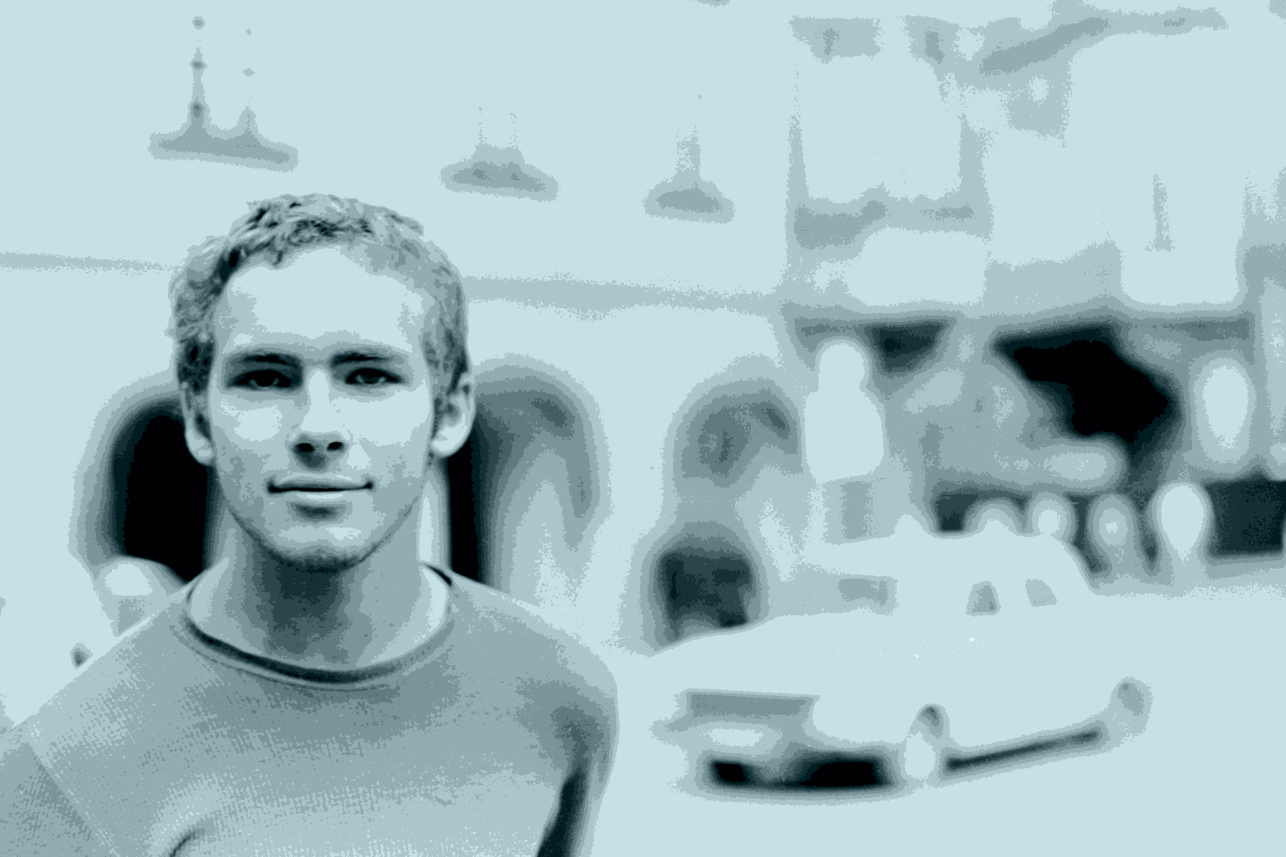 Petr Vaněček cca 1977